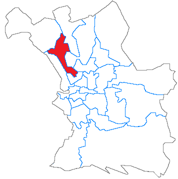 Situation du canton dans la ville de Marseille